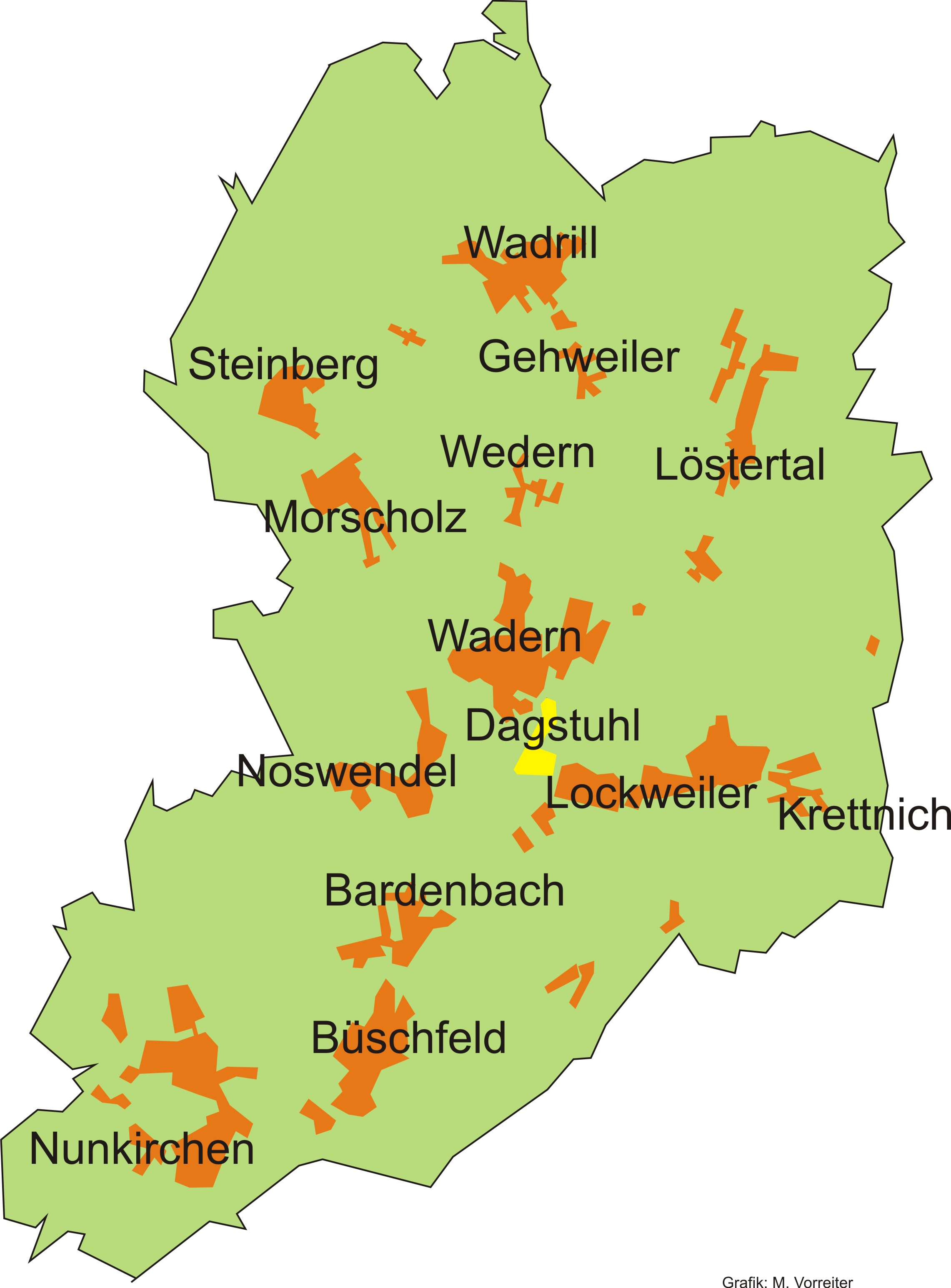 Lage des Stadtteils Dagstuhl im Stadtgebiet